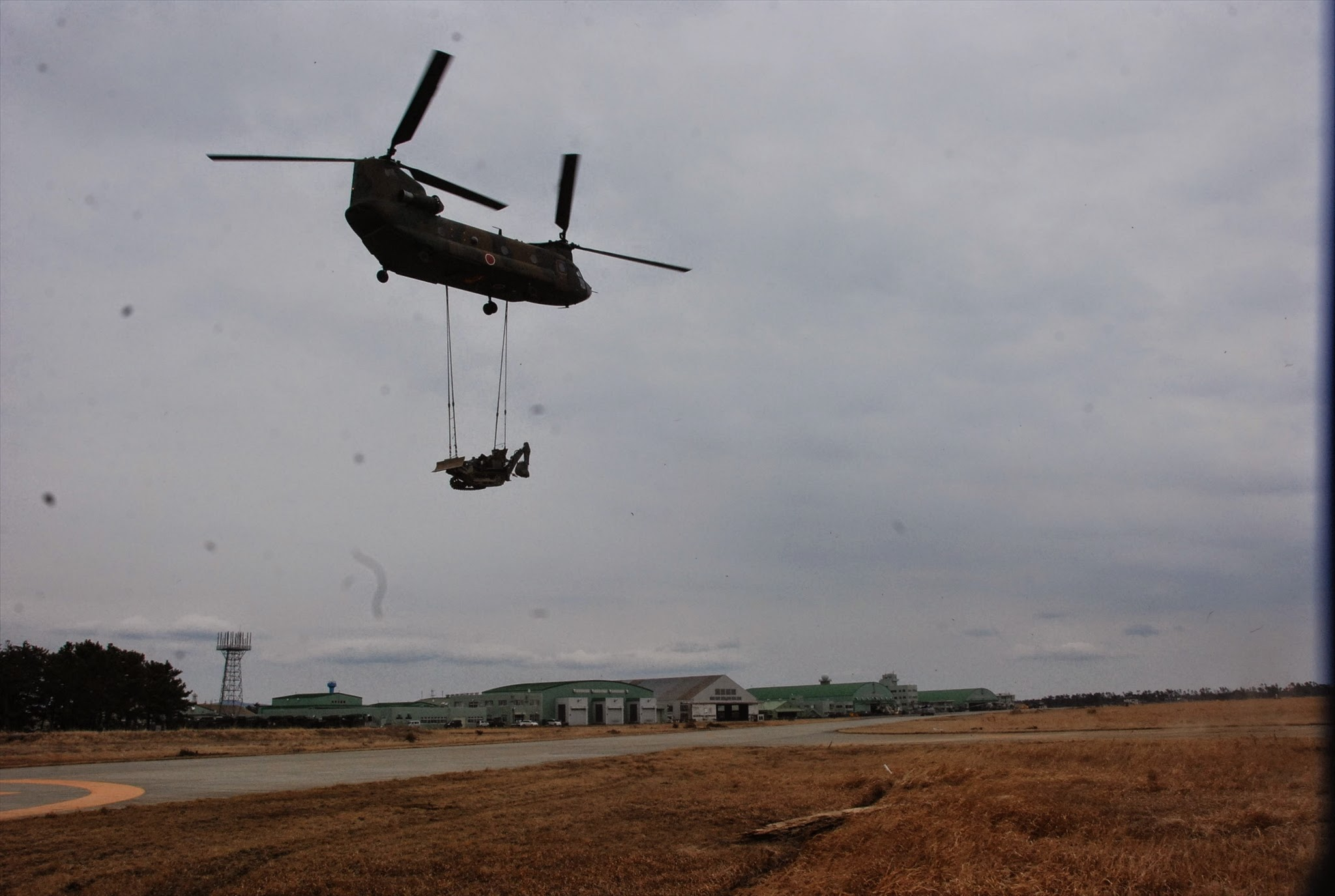 小型ドーザ（災害派遣活動）